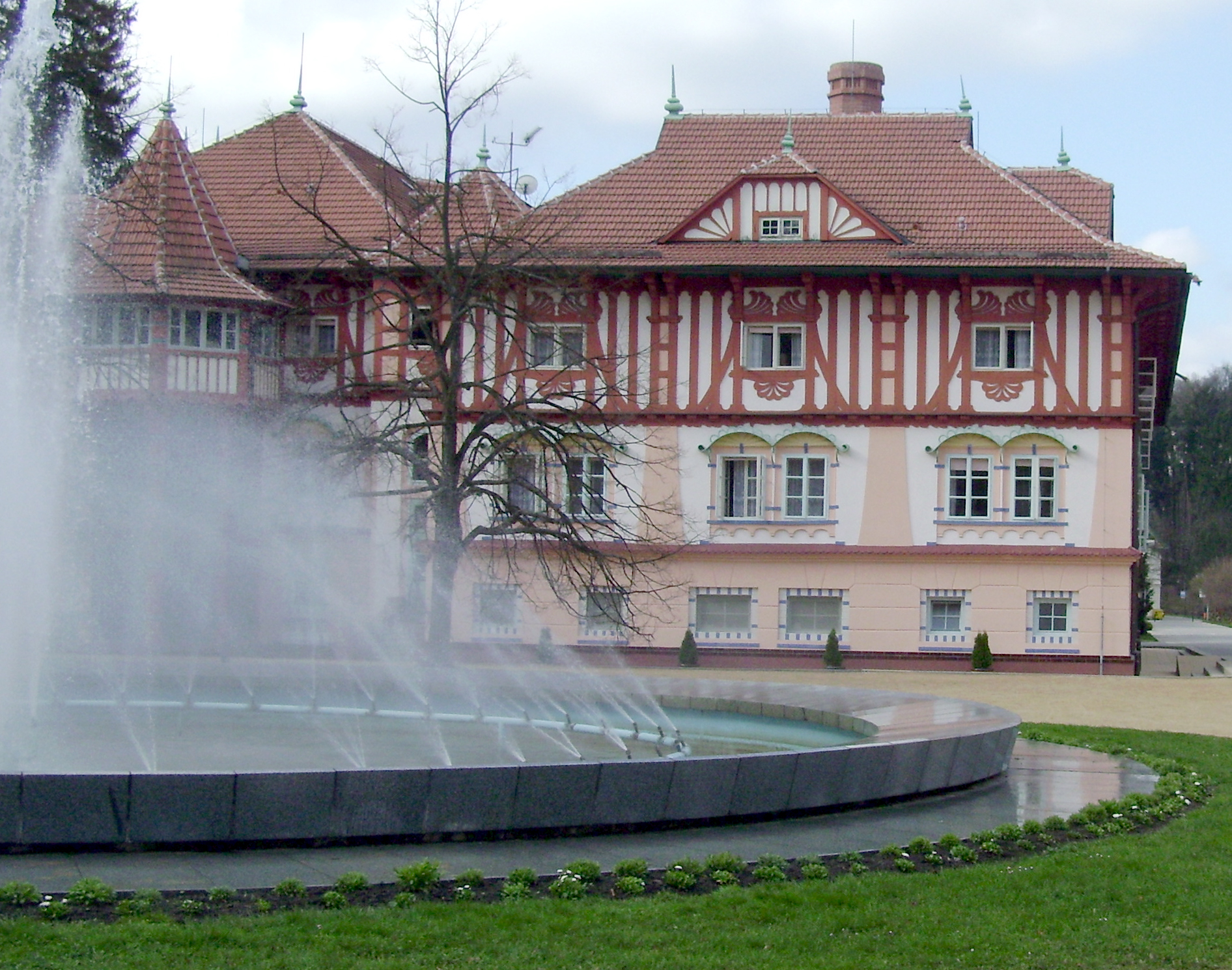 Jurkovičův dům/Luhačovice. Hotel built by Dušan Jurkovič